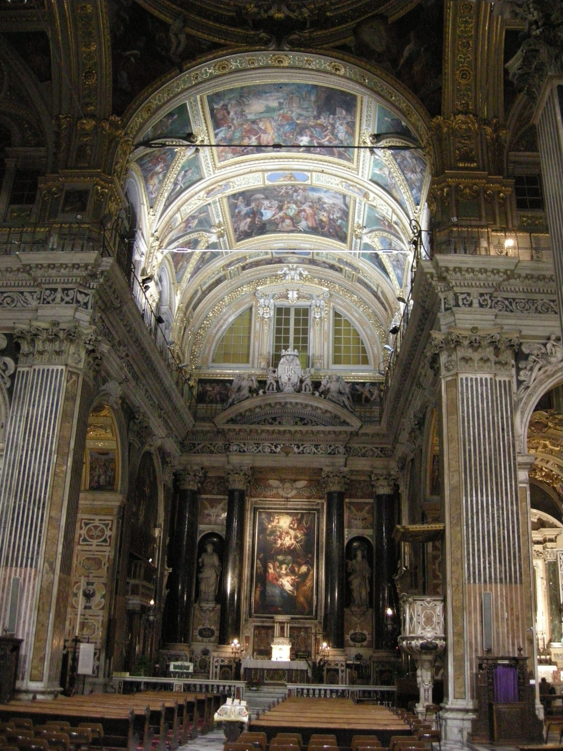 Chapelle et retable de la Circoncision de Jésus, tableau de Rubens.